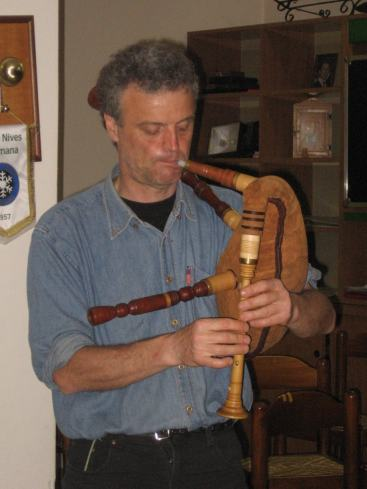 Valter Biella suona un Baghèt da lui costruito a Bergamo.